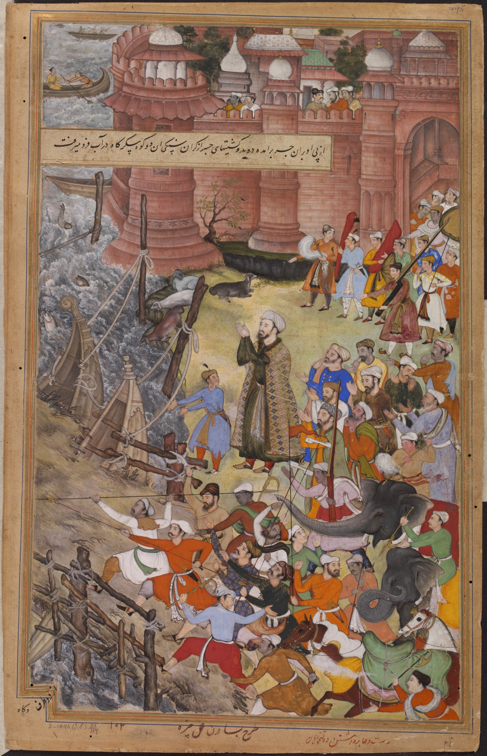 (double-page illustration)